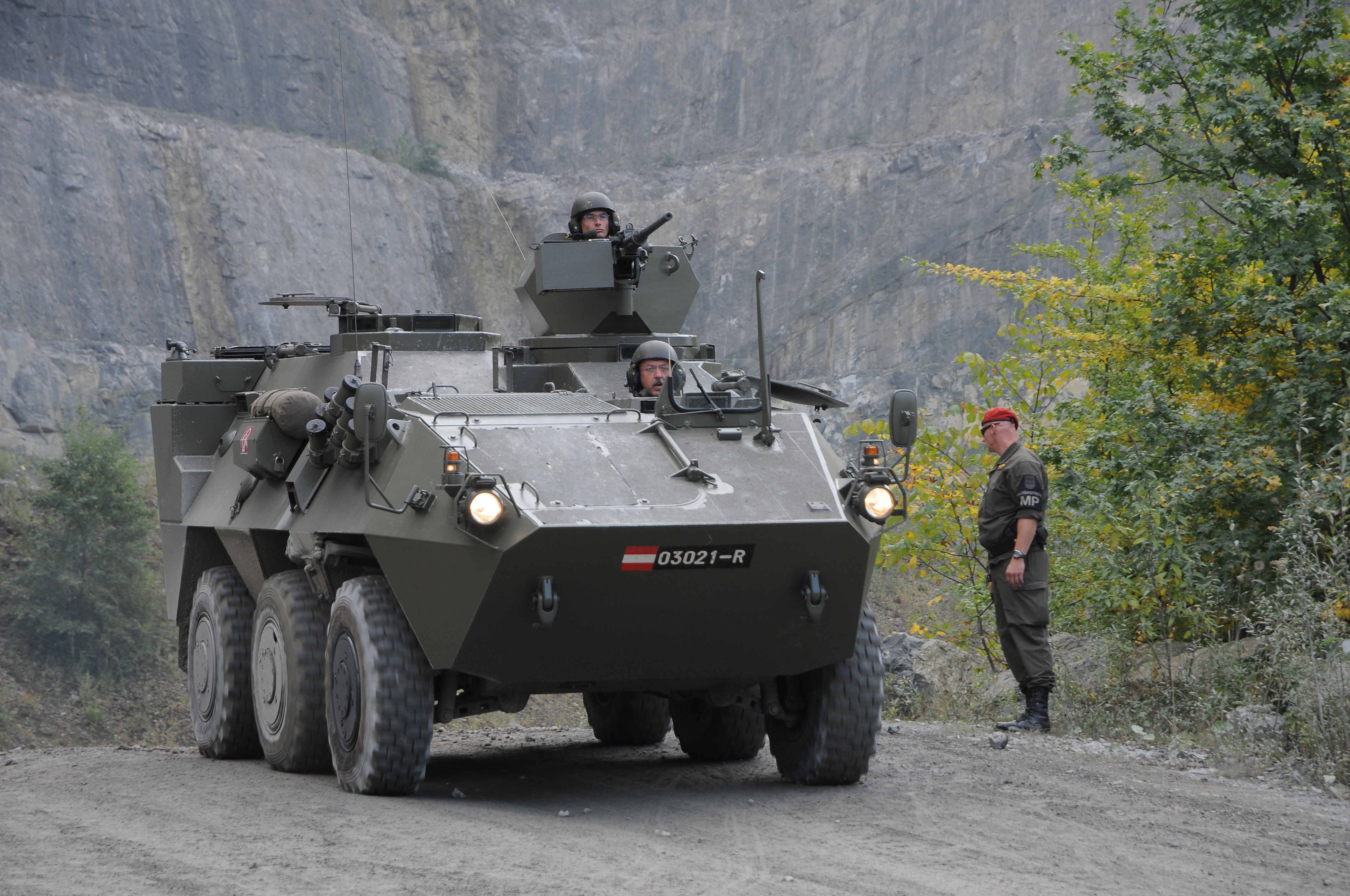 Im Zuge einer Road-Show zeigte das Österreichische Bundesheer im Dornbirner / Hohenemser Steinbruch den Radpanzer Pandur . Kurzbezeichnung: MTPz (Mannschaftstransportpanzer) "Pandur", Gewicht: 13,5 t, Motorleistung: 191 kW (250 PS), Höchstgeschwindigkeit: 100 km/h, Steigfähigkeit: 70 %, Besatzung: 9 Mann, Bewaffnung: 12,7 mm üsMG M2.